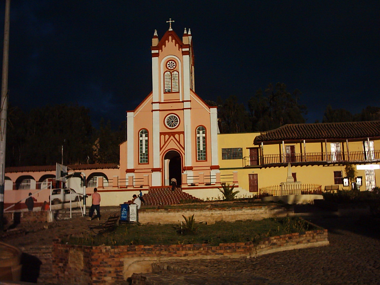 Iglesia de Cuitiva (Boyacá), Colombia